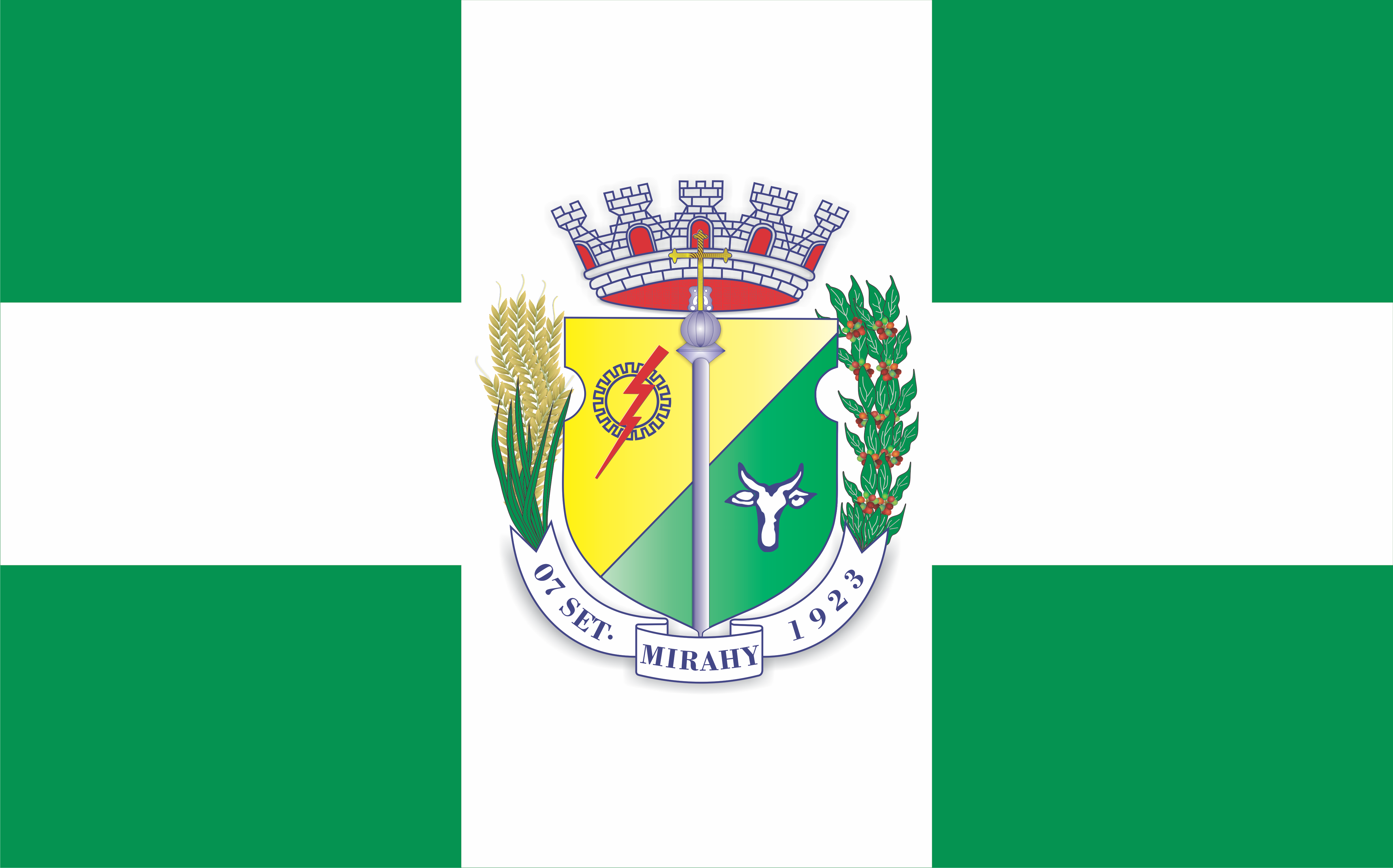 Bandeira do Município de Miraí, Minas Gerais, Brasil